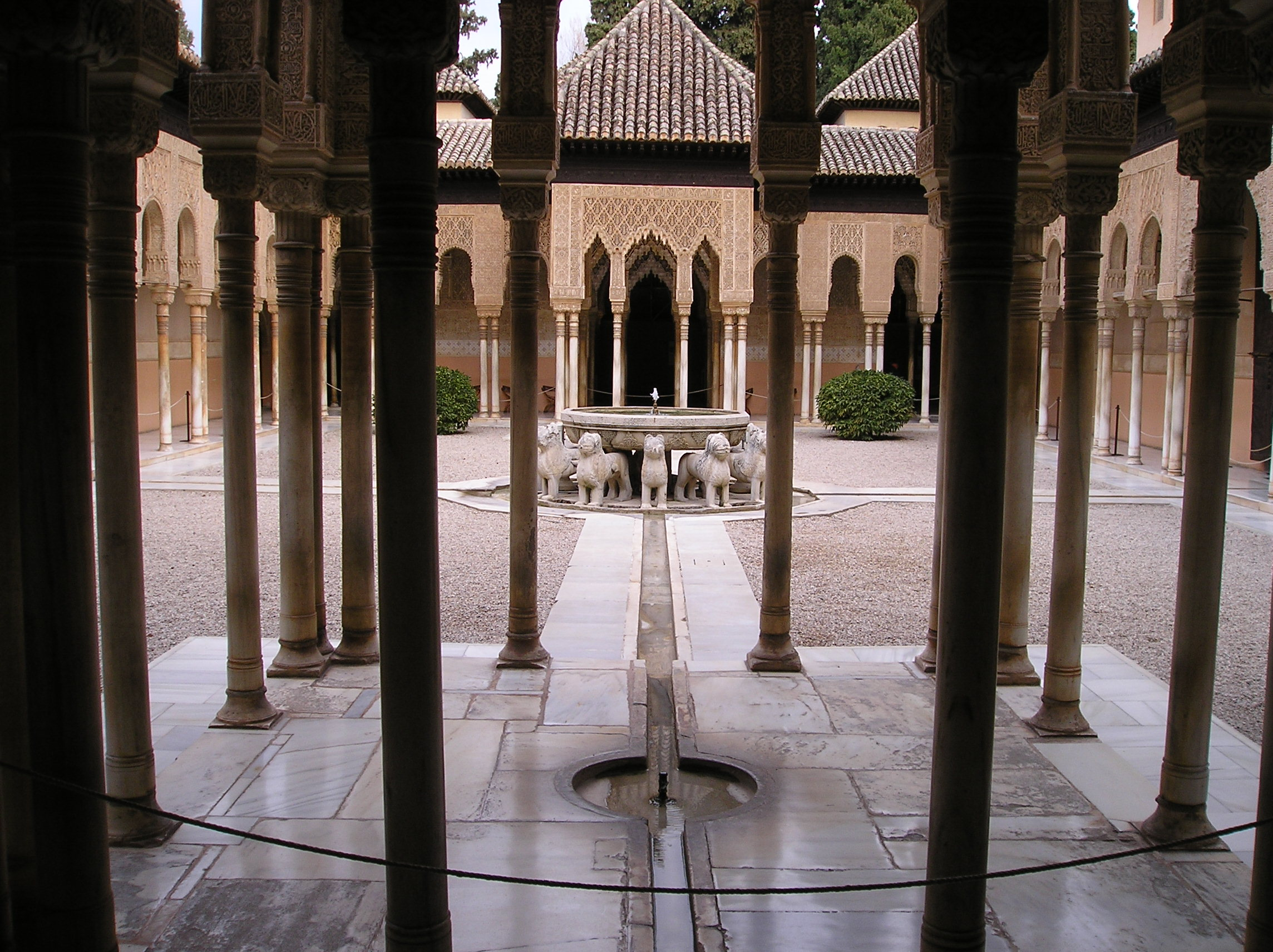 Patio de los Leones (Granada)